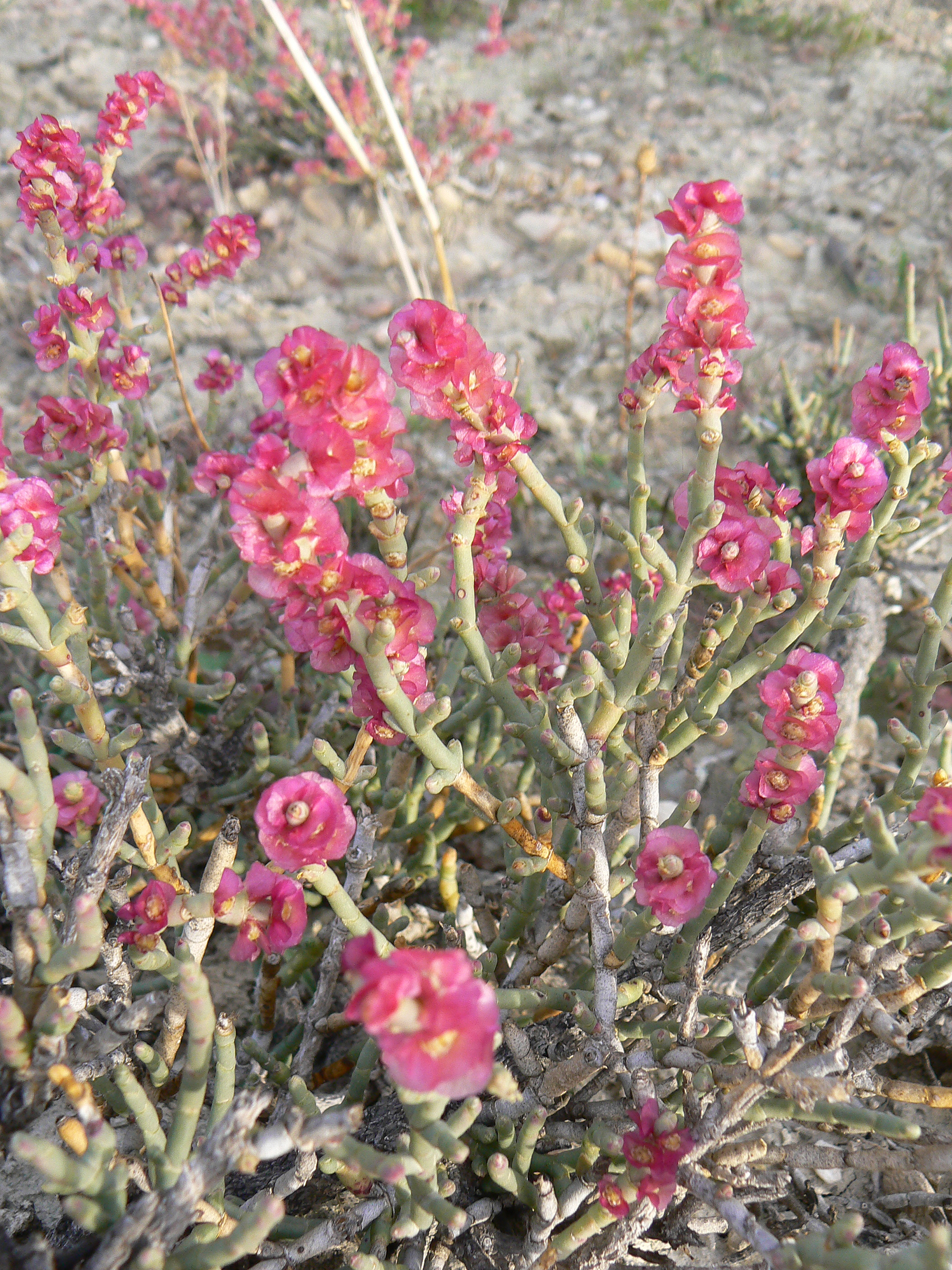 Anabasis articulata à Desert Springs, Cuevas del Almanzora, Province d'Almería, Espagne